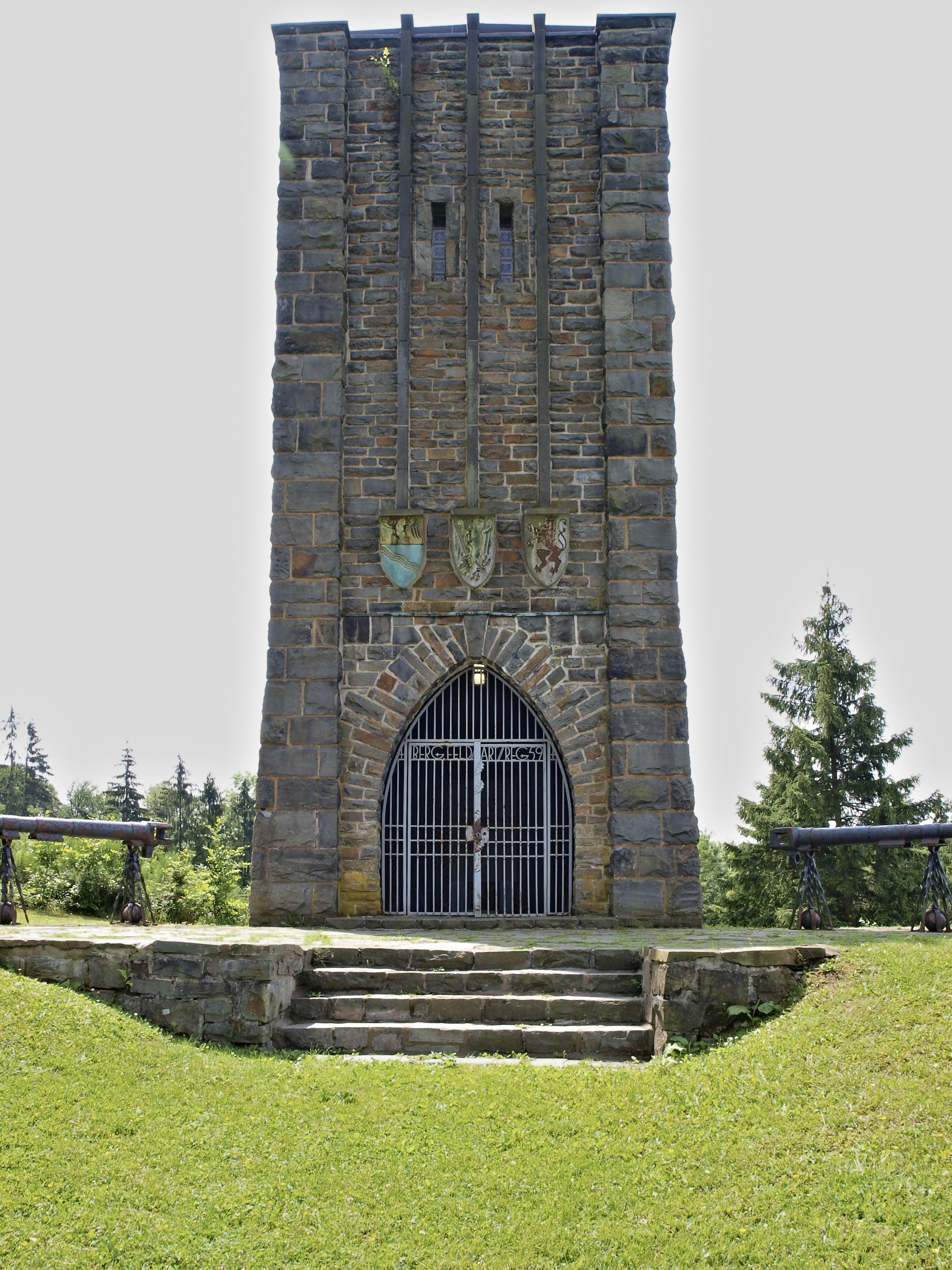 Ehrenmal Bergisches Feldartillerie Regiment 59